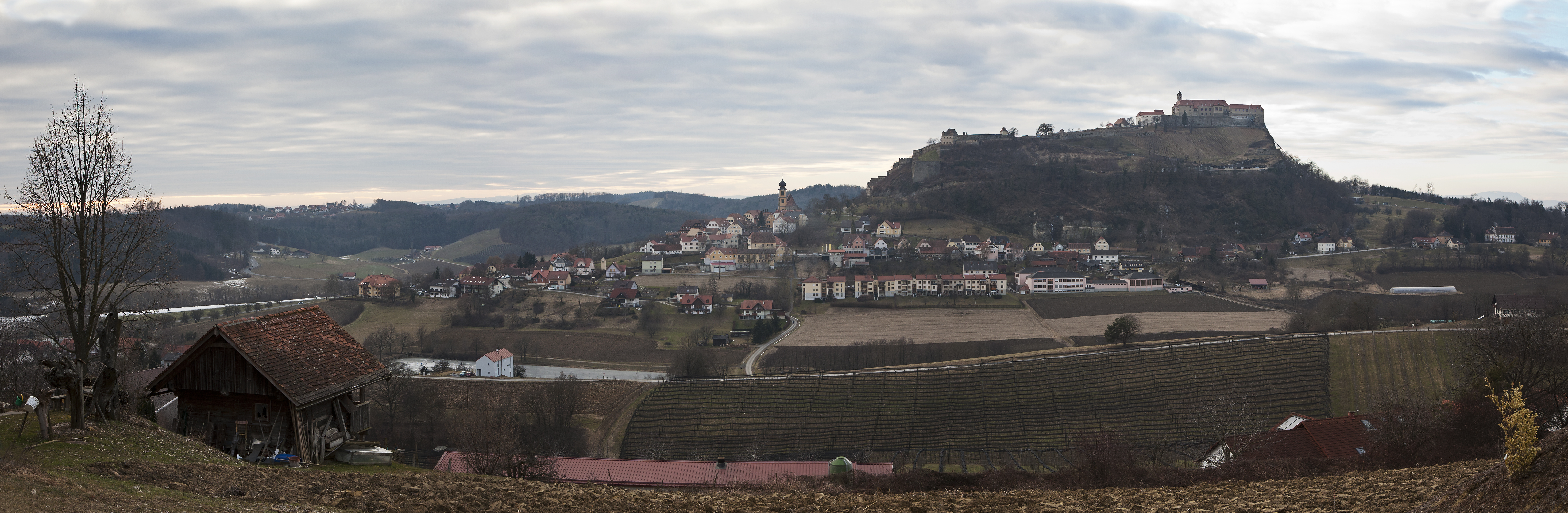 Riegersburg vom Hofberg_Ostansicht